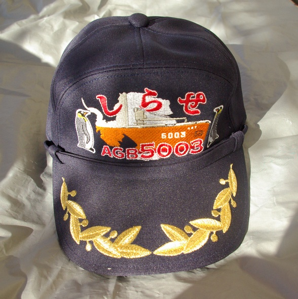 しらせ艦長用部隊識別帽